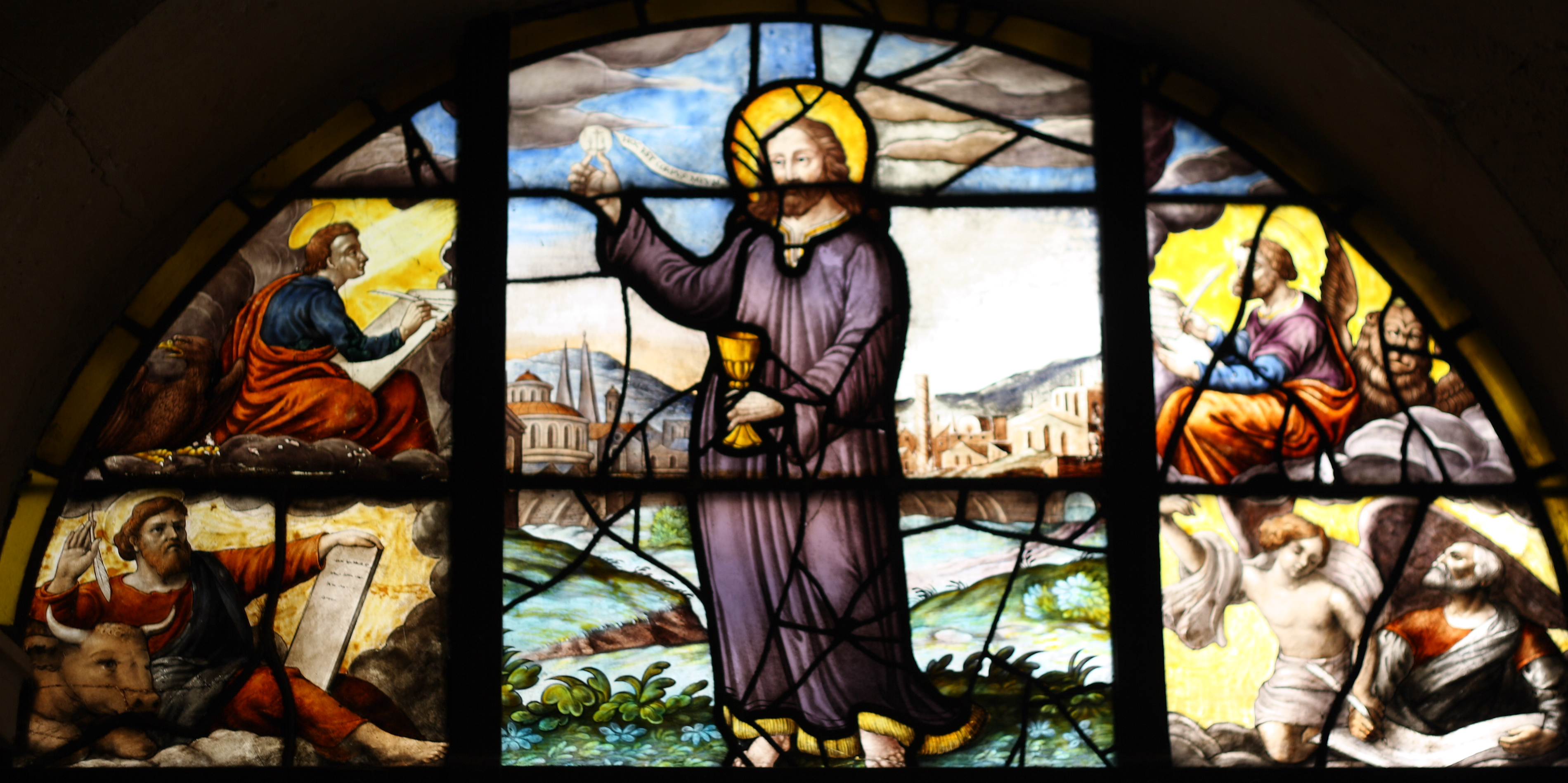 Bleiglasfenster (Ausschnitt) in der "Chapelle des Catéchismes" der Kirche St-Étienne-du-Mont in Paris